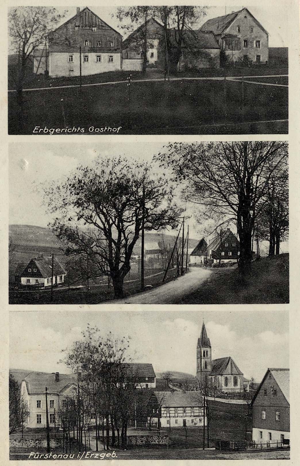 Fürstenau (Geising)